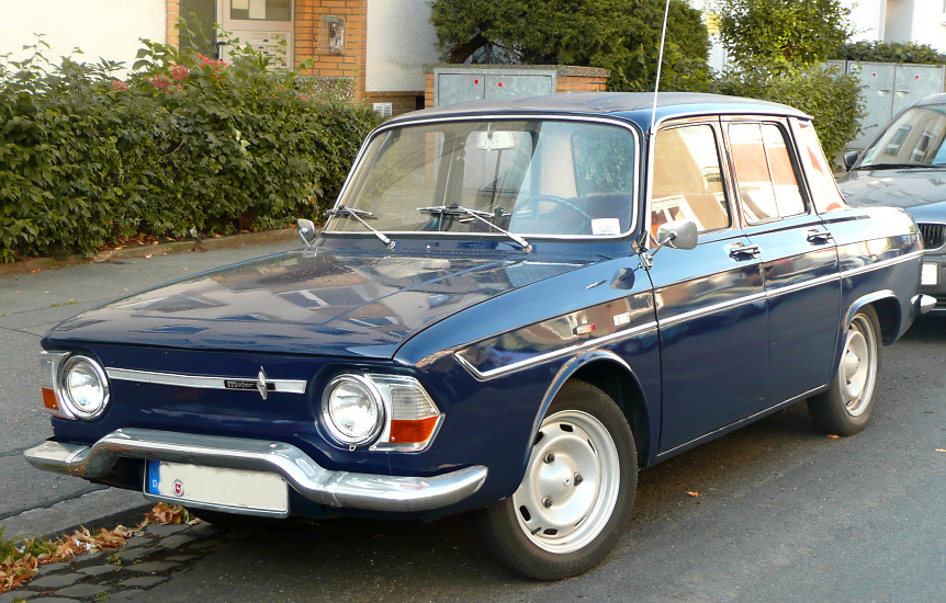 Dies ist ein Renault R 10 Major, der Dateiname "Renault R 8 Major" ist irreführend